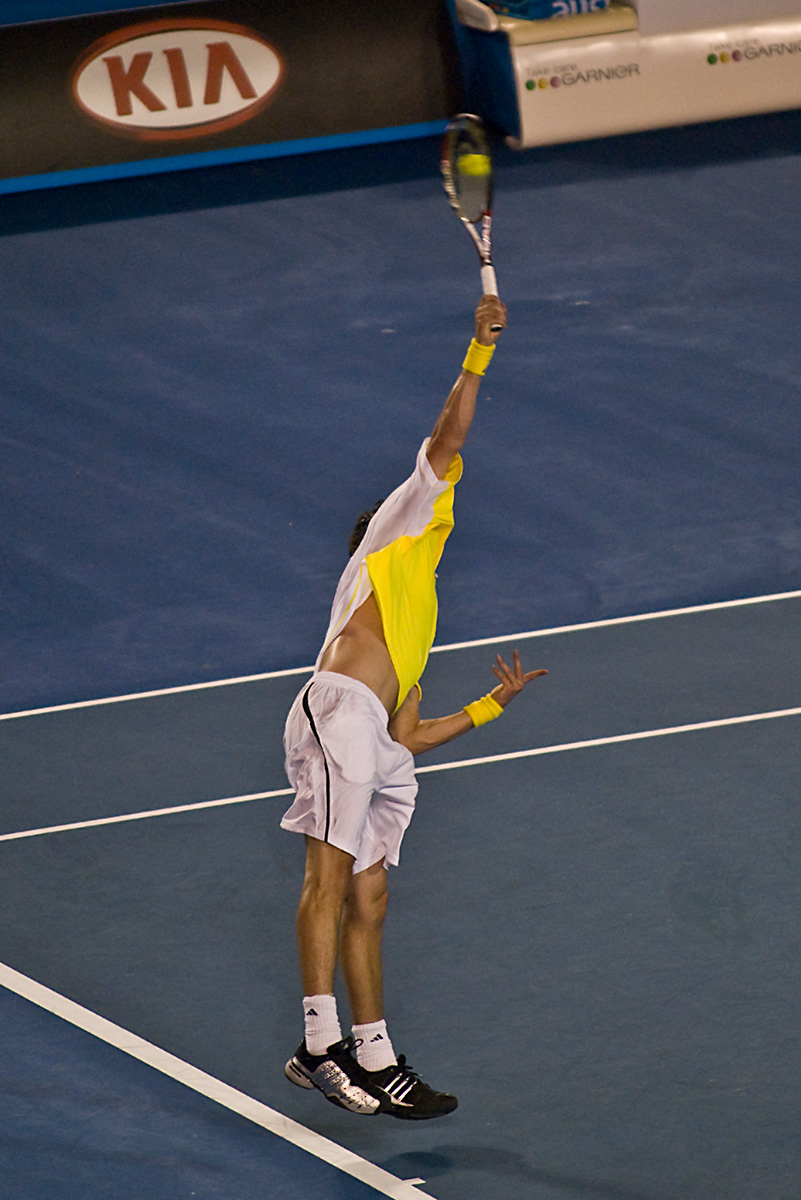 Safin